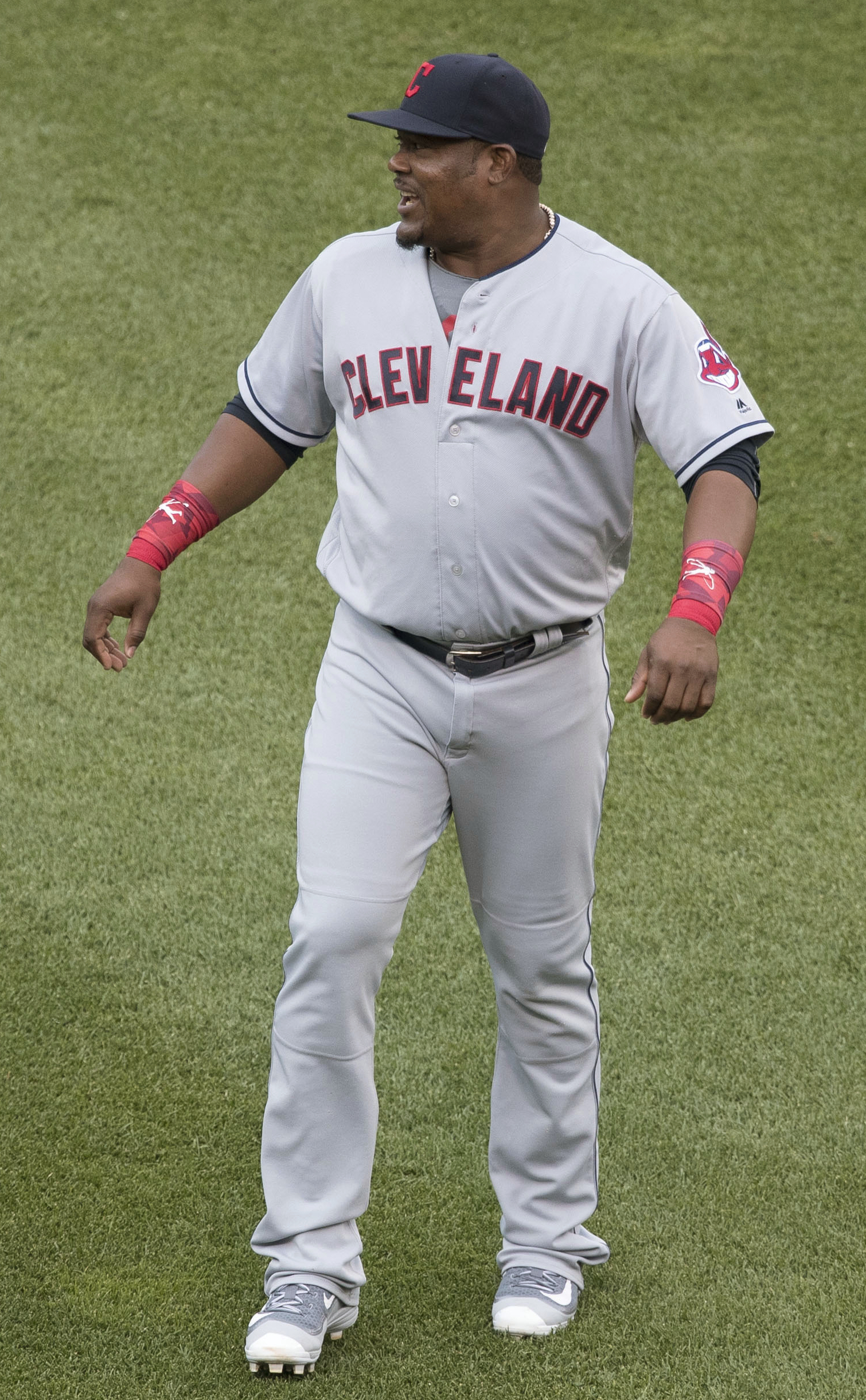 Juan Uribe